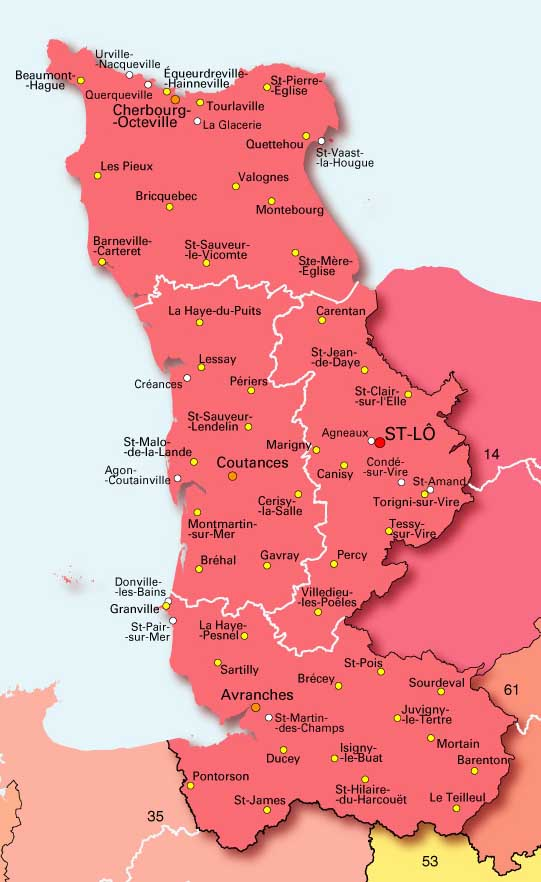 Carte du département de la Manche autorisation de diffusion sous GFDL [1]